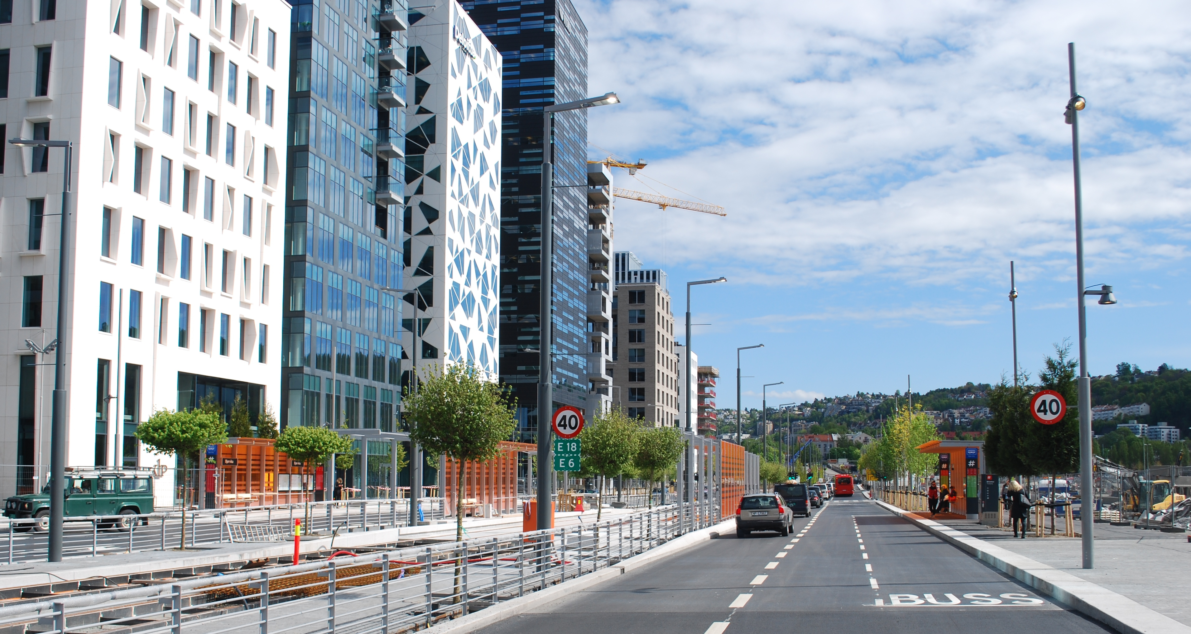 Dronning Eufemias gate, Bjørvika i Oslo, mai 2014, sett mot øst